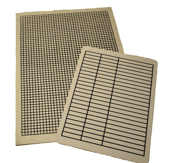 Jak může vypadat podložka do sešitu.